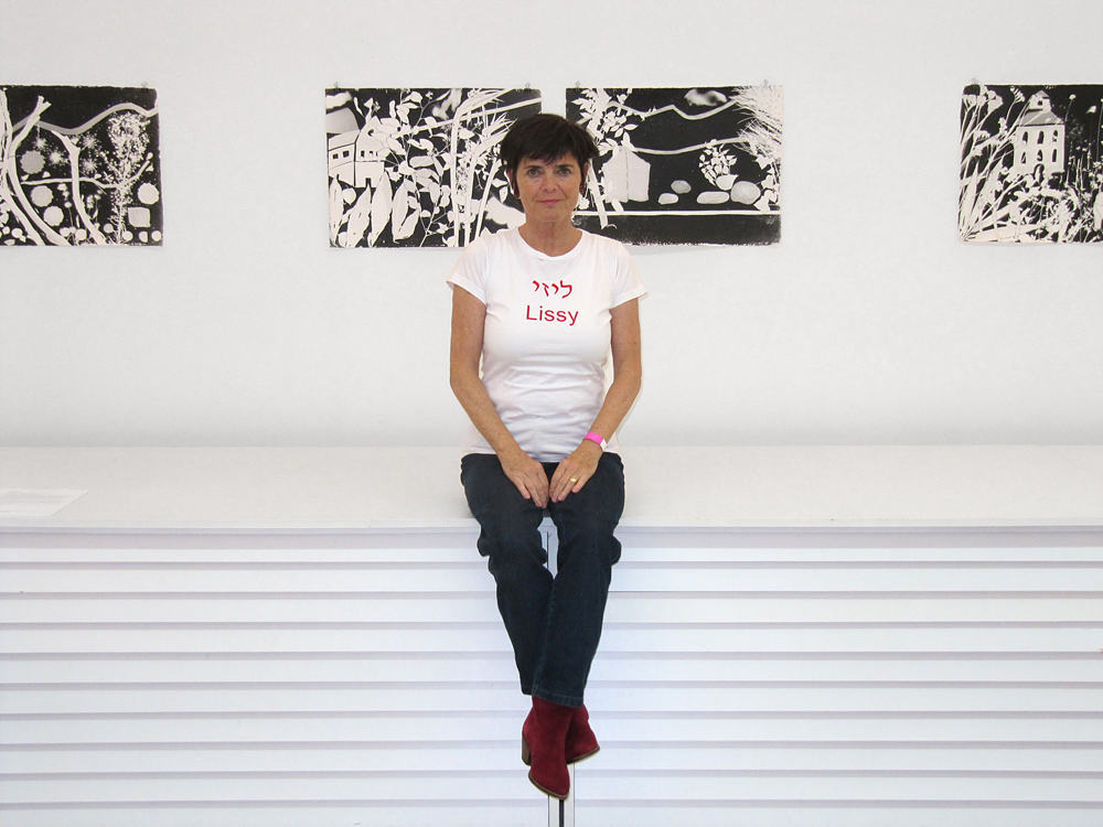 Lissy Winterhoff im Atelier, 2014